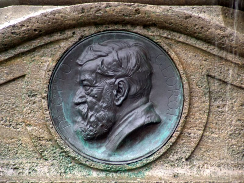 Rathausbrunnen in Leipzig, Portraitmedaillon Otto Georgi